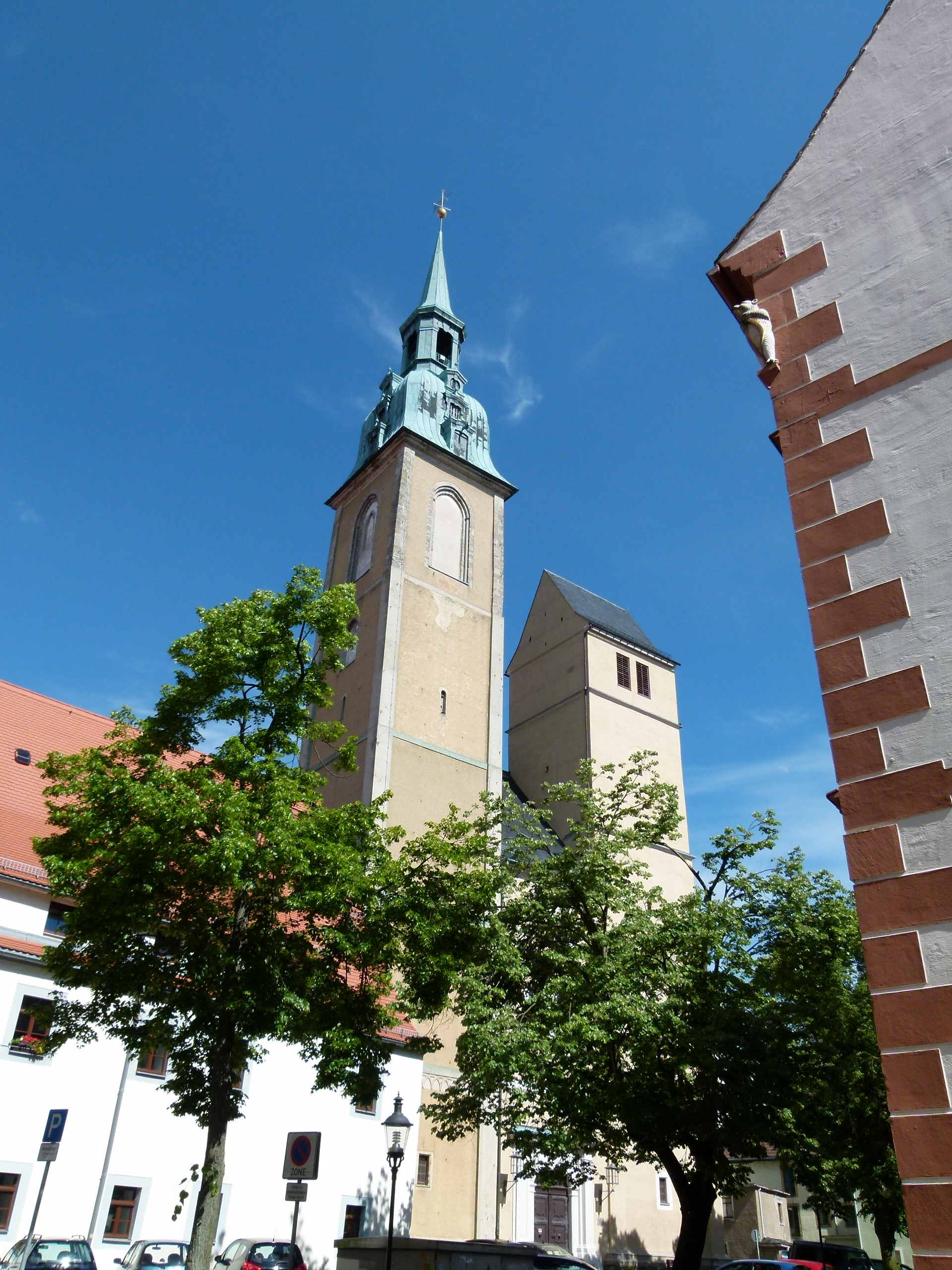 Petrikirche, Freiberg, Sachsen